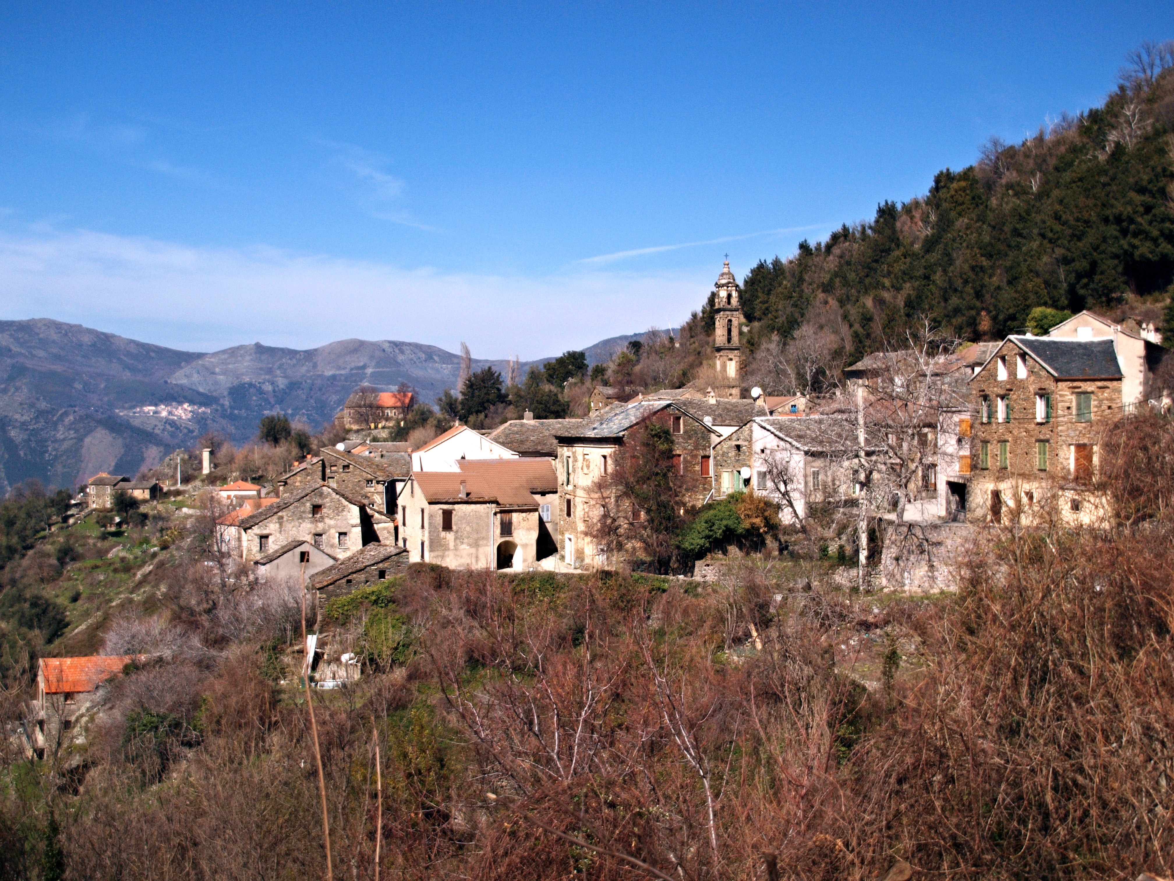 Castello-di-Rostino, Rustinu (Corse) - Vue du village de Pastoreccia avec, en arrière, le clocher de l'église paroissiale Sainte-Marie à Baranciasche